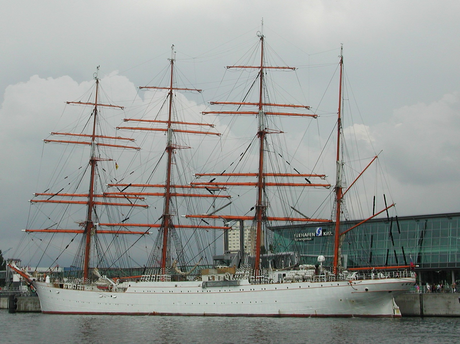 Segelschiff Sedow im Kieler Hafen.